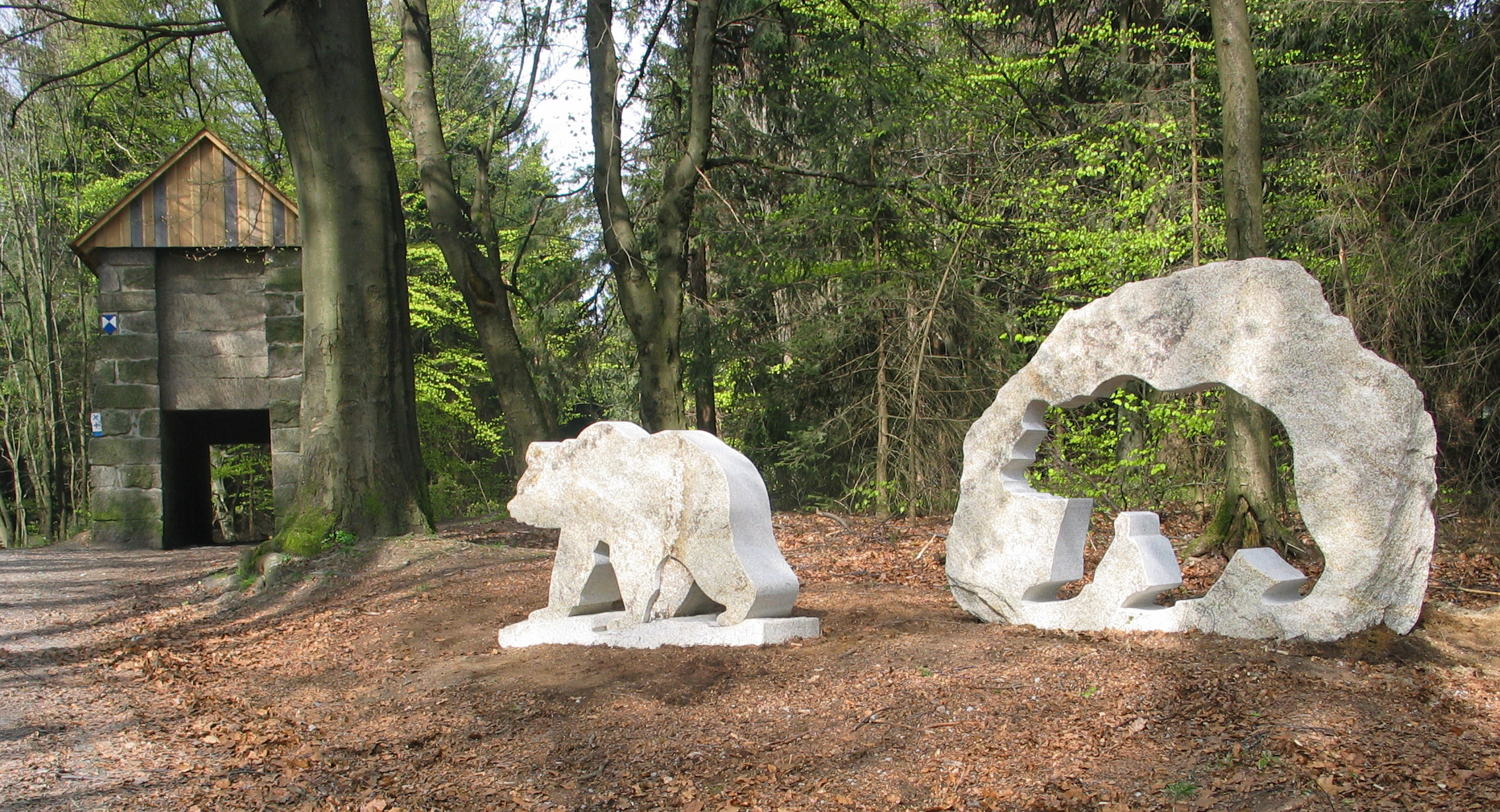 Bärenfang mit neuem Gedenkstein